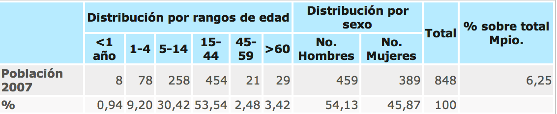 Censo en el Año 2007 Yurayaco